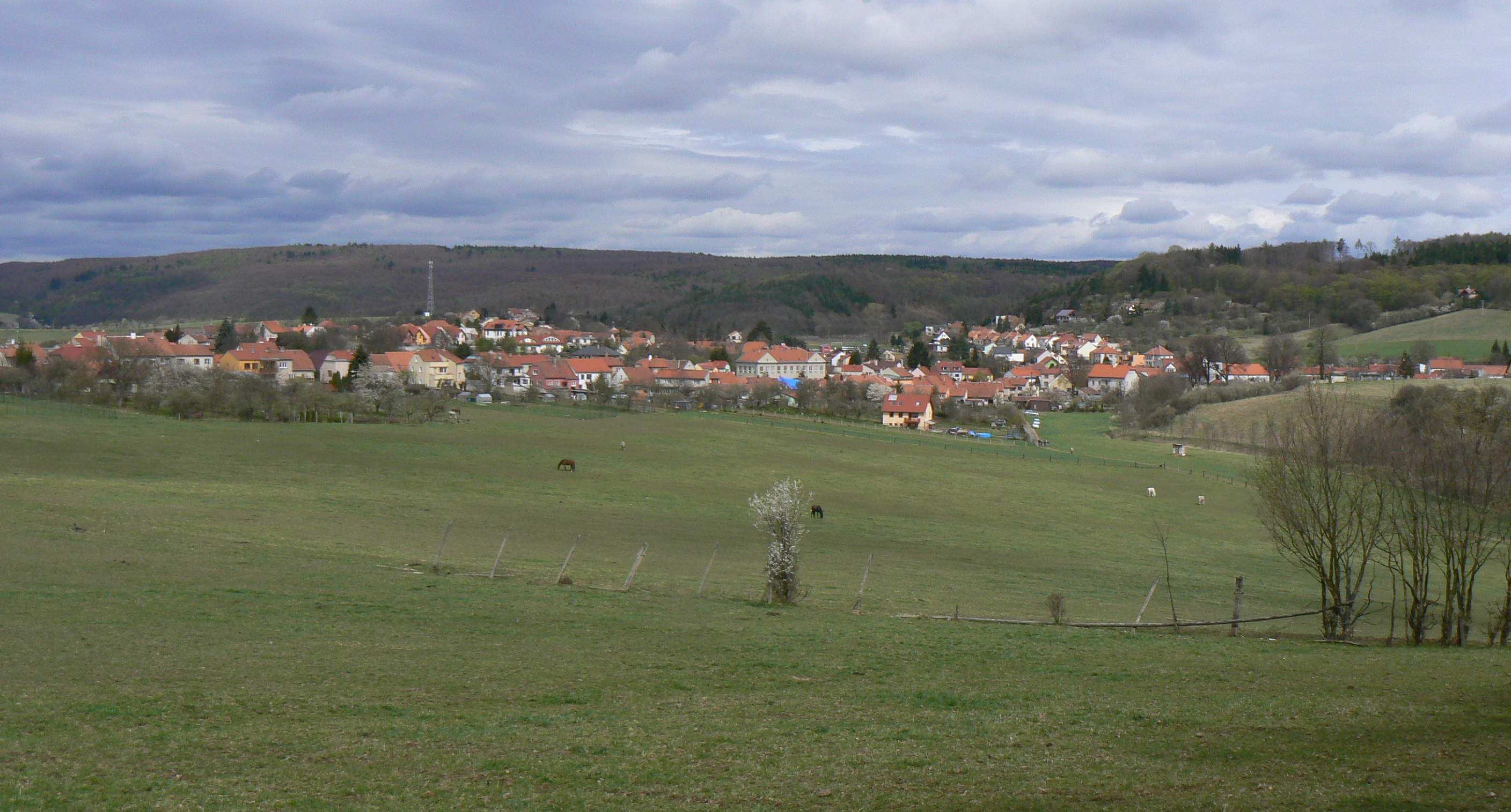 Pohled na Ochoz u Brna od jihu.